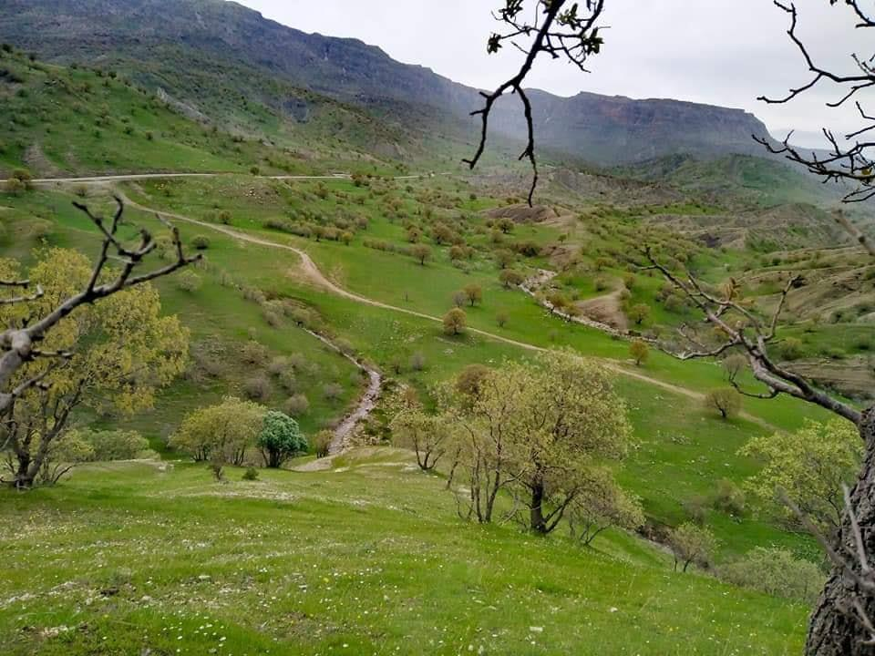 کوردی: گوندی چوارداران